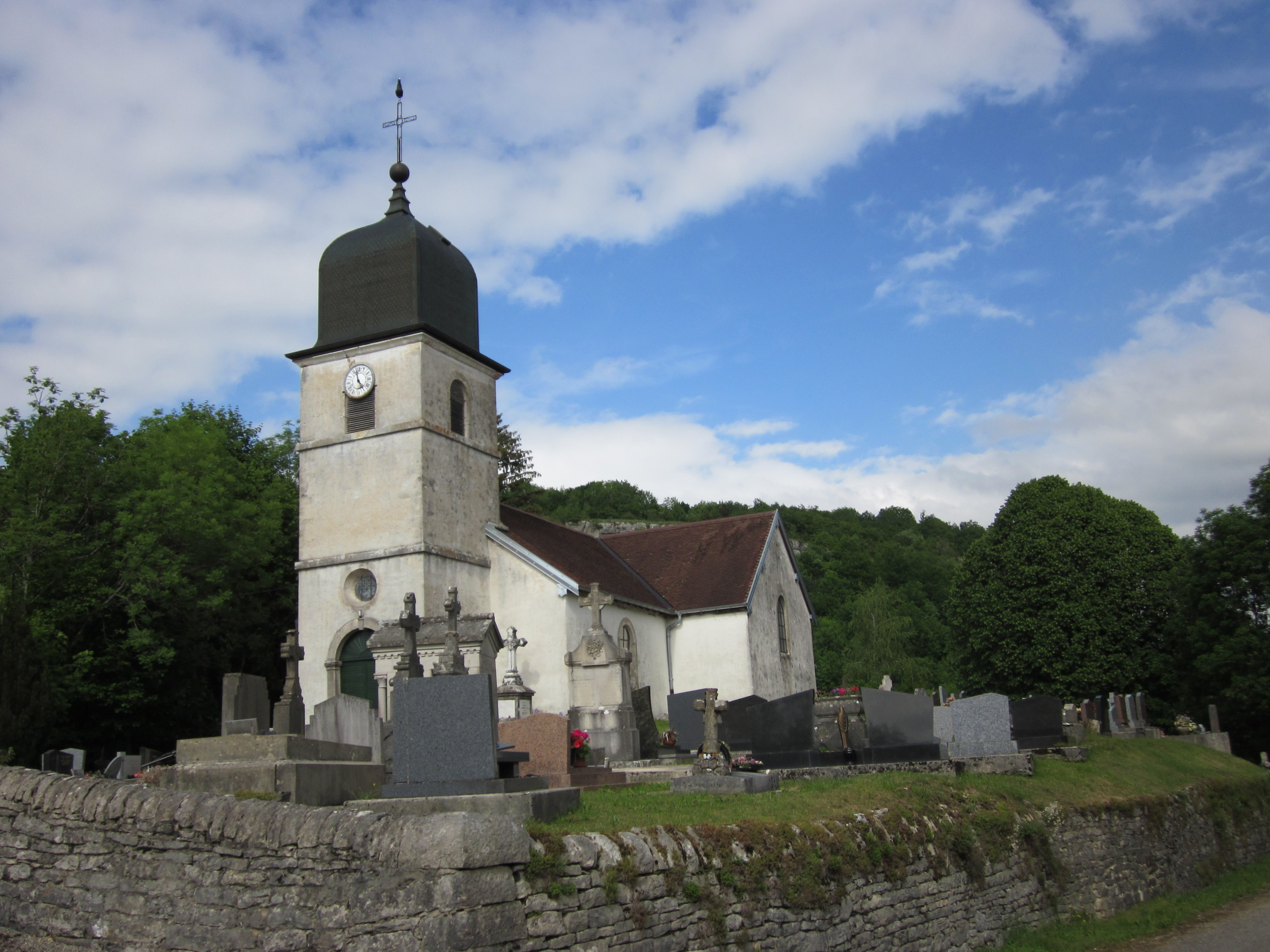 église de Doucier - département du Jura - France